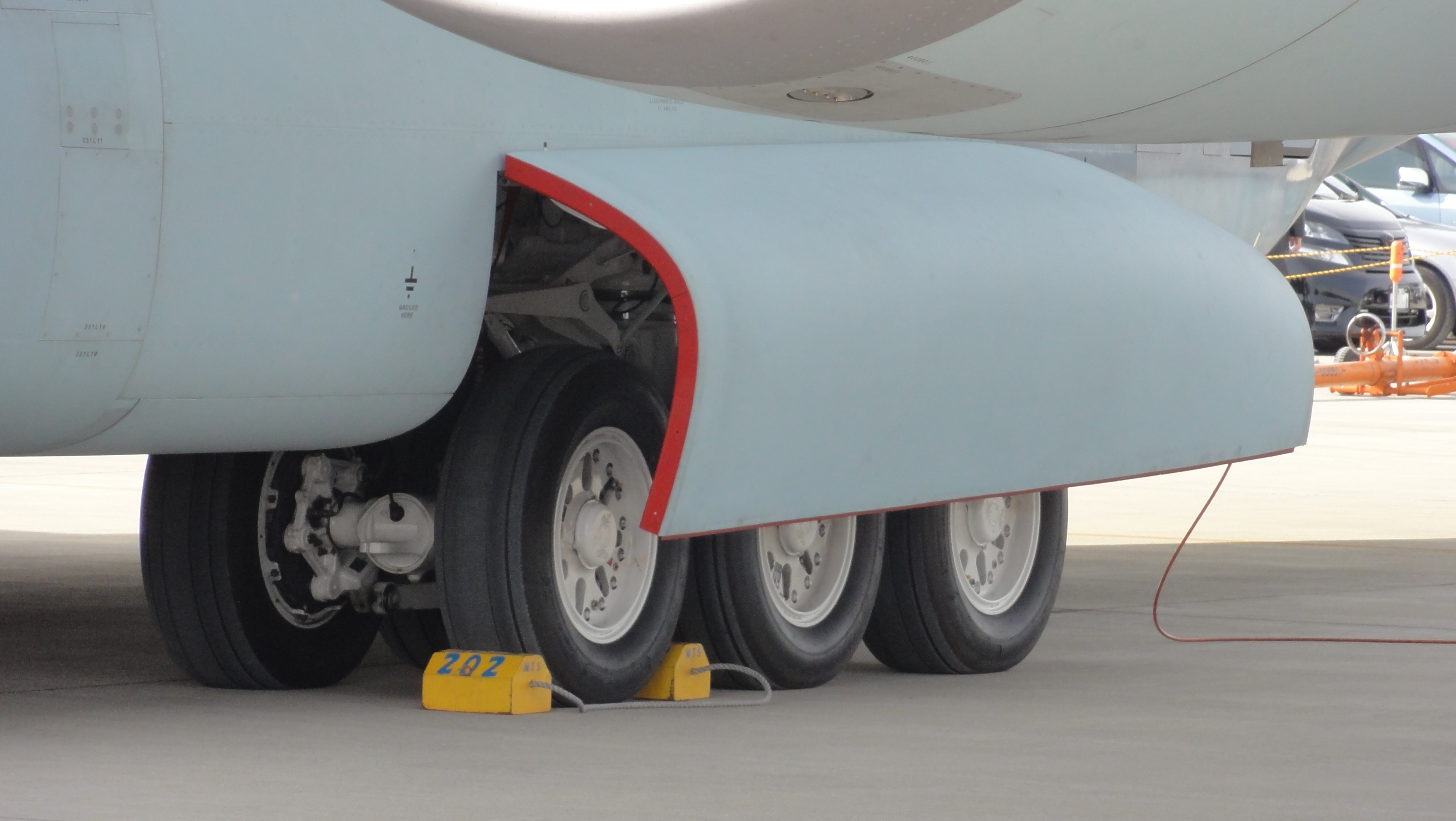 XC-2 202号機 主脚 11年11月27日 航空自衛隊岐阜基地にて